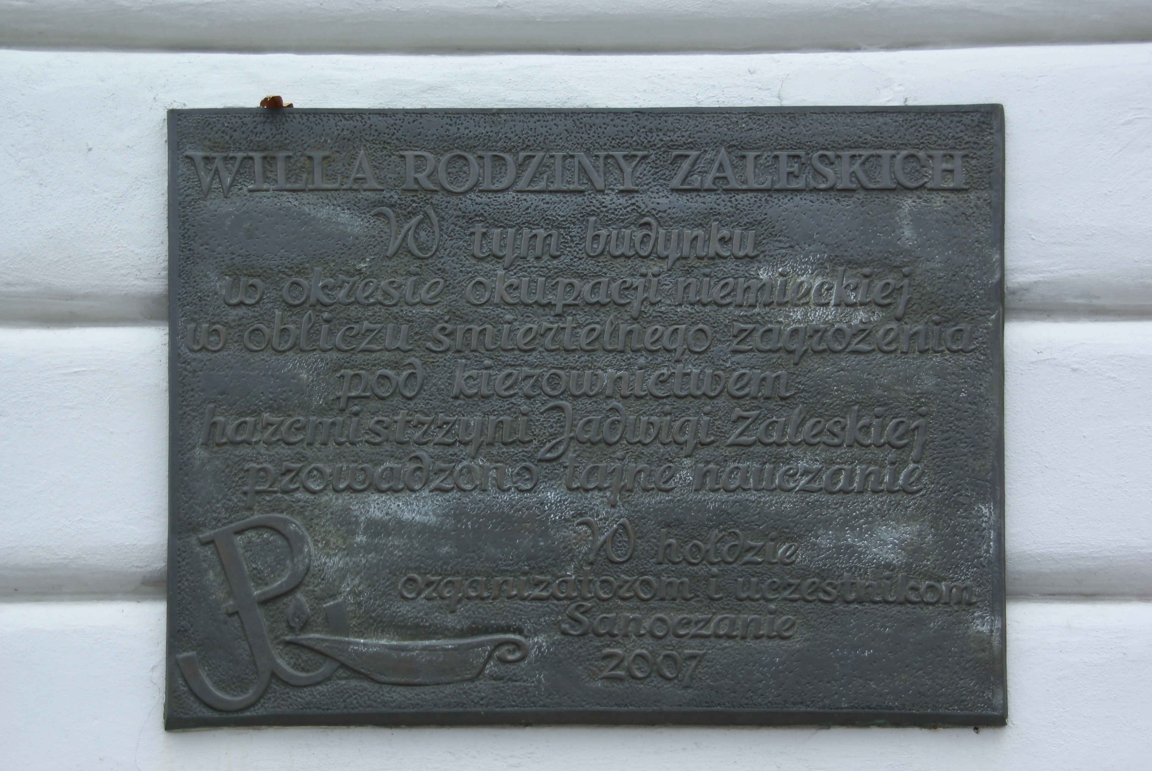 Tablica pamiątkowa Willa Zaleskich w Sanoku 2007